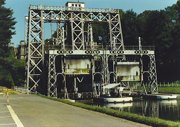 Schiffshebewerk Nr. 3 Canal du Centre